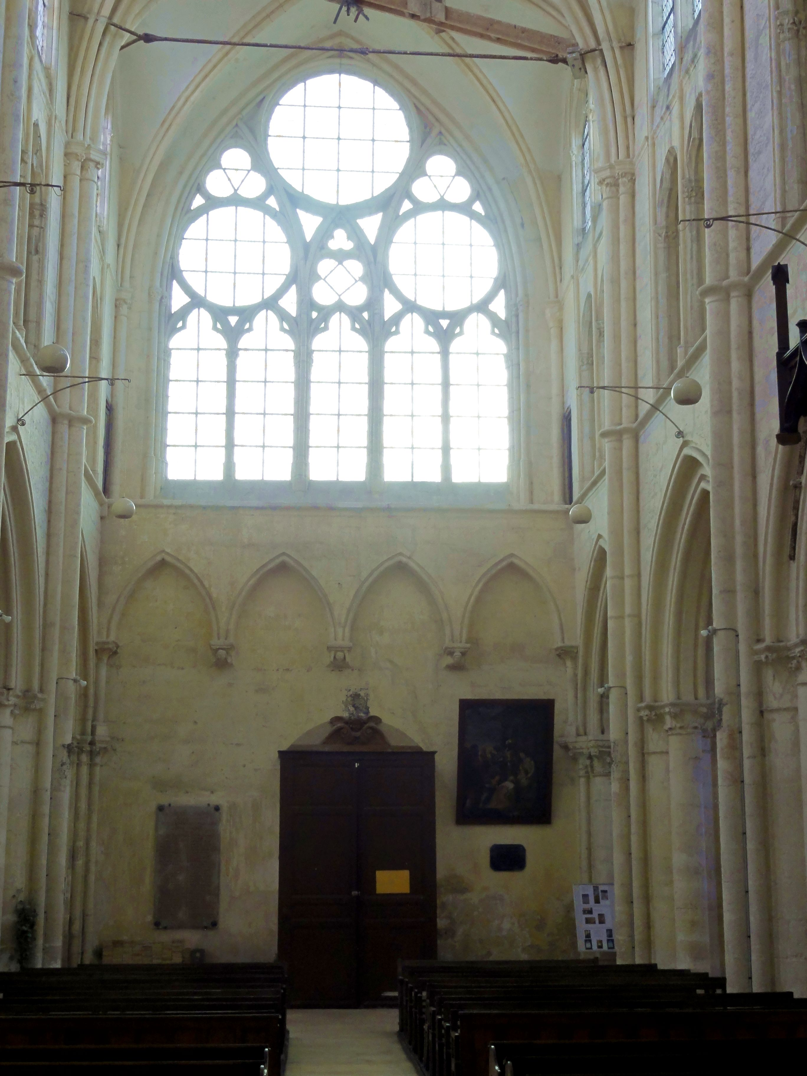 Nef, vue vers l'ouest.